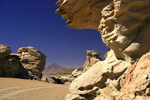 Felsformation bei dem Arbol de Piedra in Bolivien